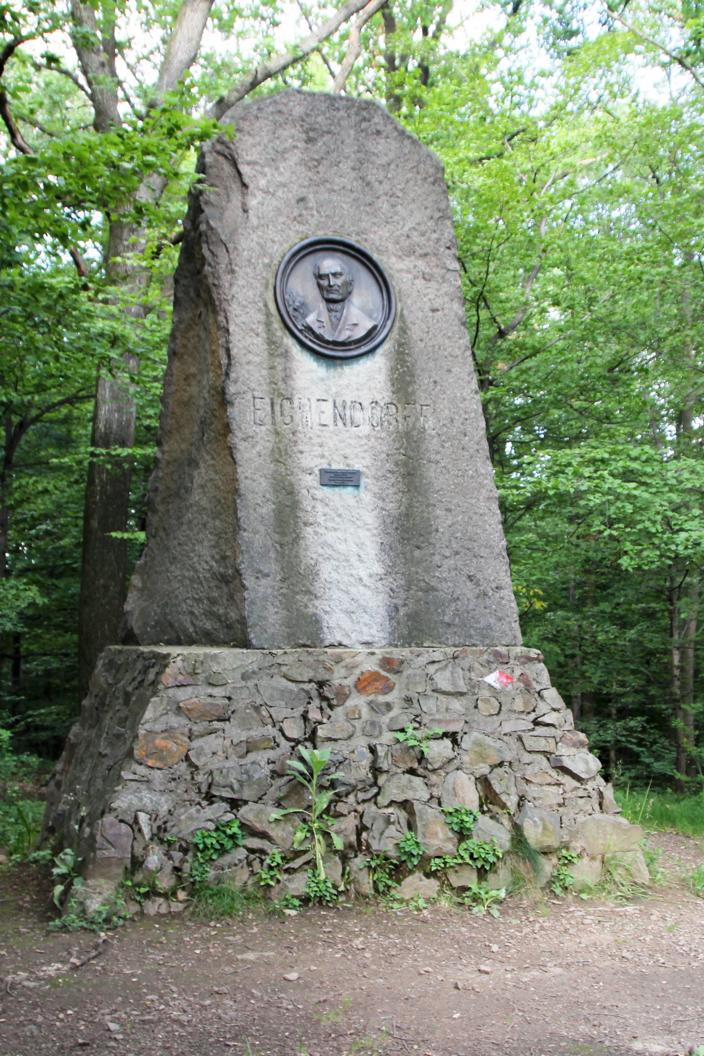 Pomnik Josepha von Eichendorffa w Lesie Prudnickim w Parku Krajobrazowym Góry Opawskie w województwie opolskim, w powiecie prudnickim w gminie Prudnik.